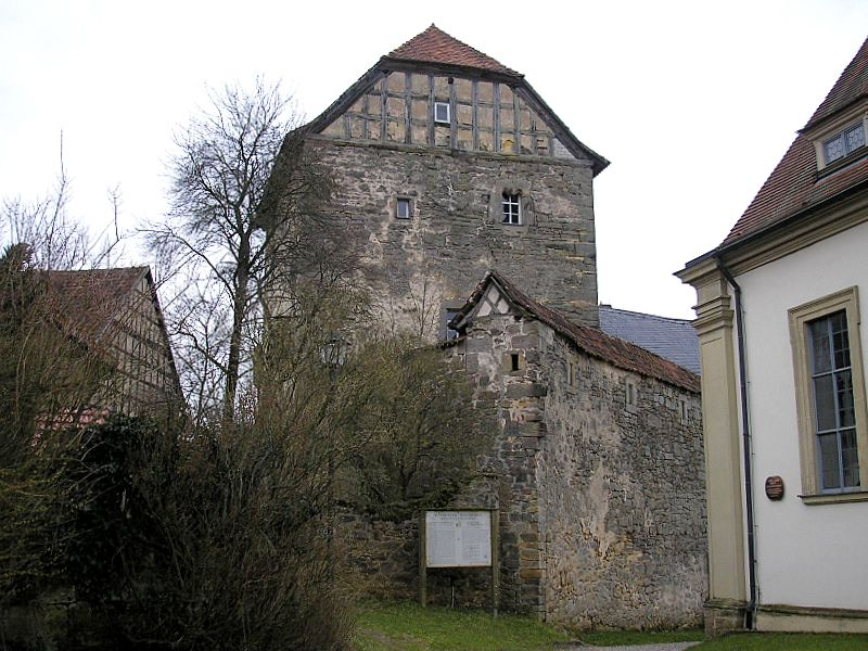 Burg Lichtenstein, Südburg (Gemeinde Pfarrweisach, Landkreis Haßberge, Unterfranken). Ostteil. Der gotische Wohnturm, rechts die Kirche / Lichtenstein castle (Southern part)) near Pfarrweisach (Lower Franconia, Germany). The gothic keep and the church (right). Own photo, Aug. 2007